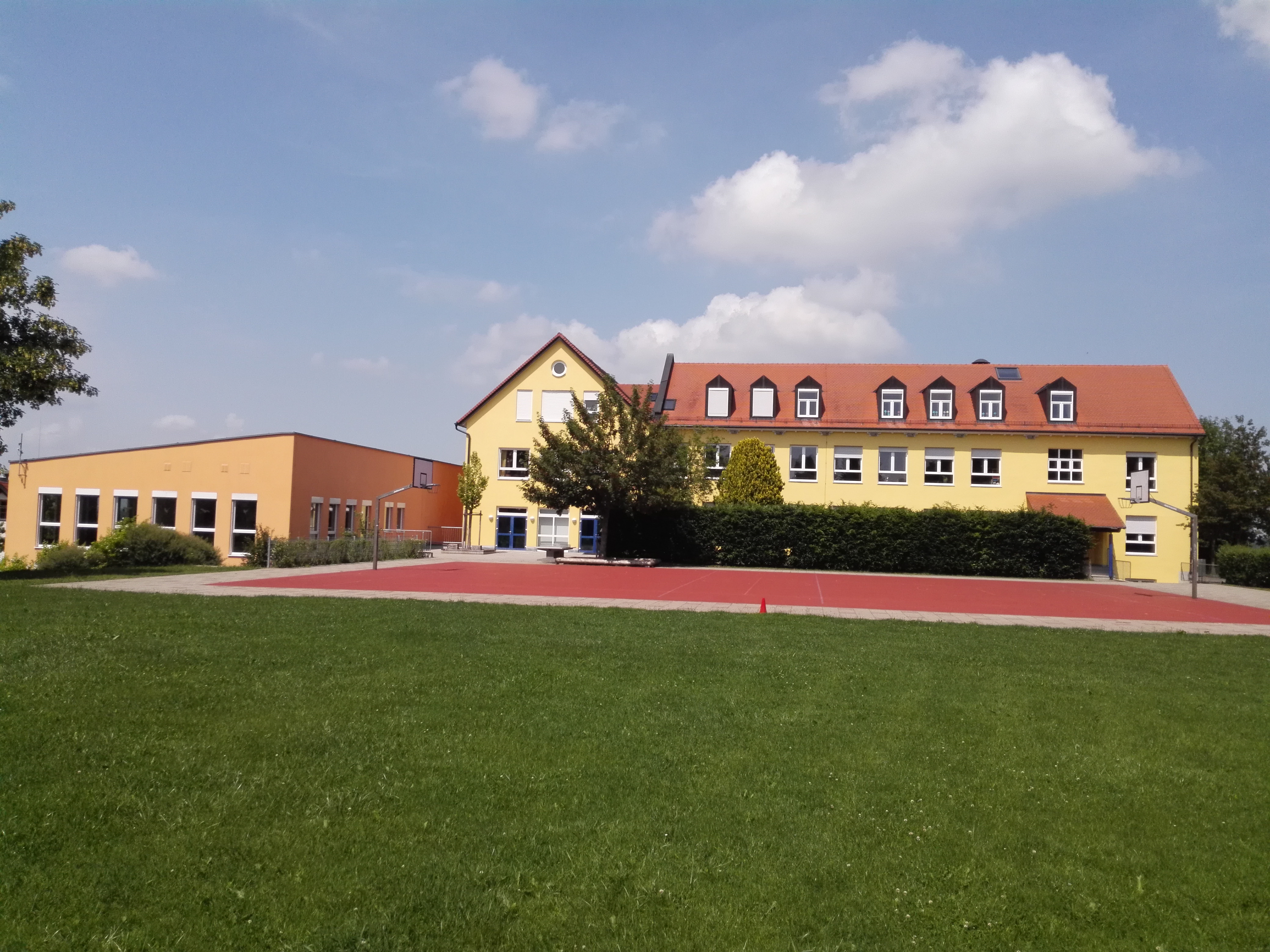 Grundschule, vorm. Volksschule Aufkirchen im Ortsteil Aufkirchen von Egenhofen, gesehen vom Sportplatz